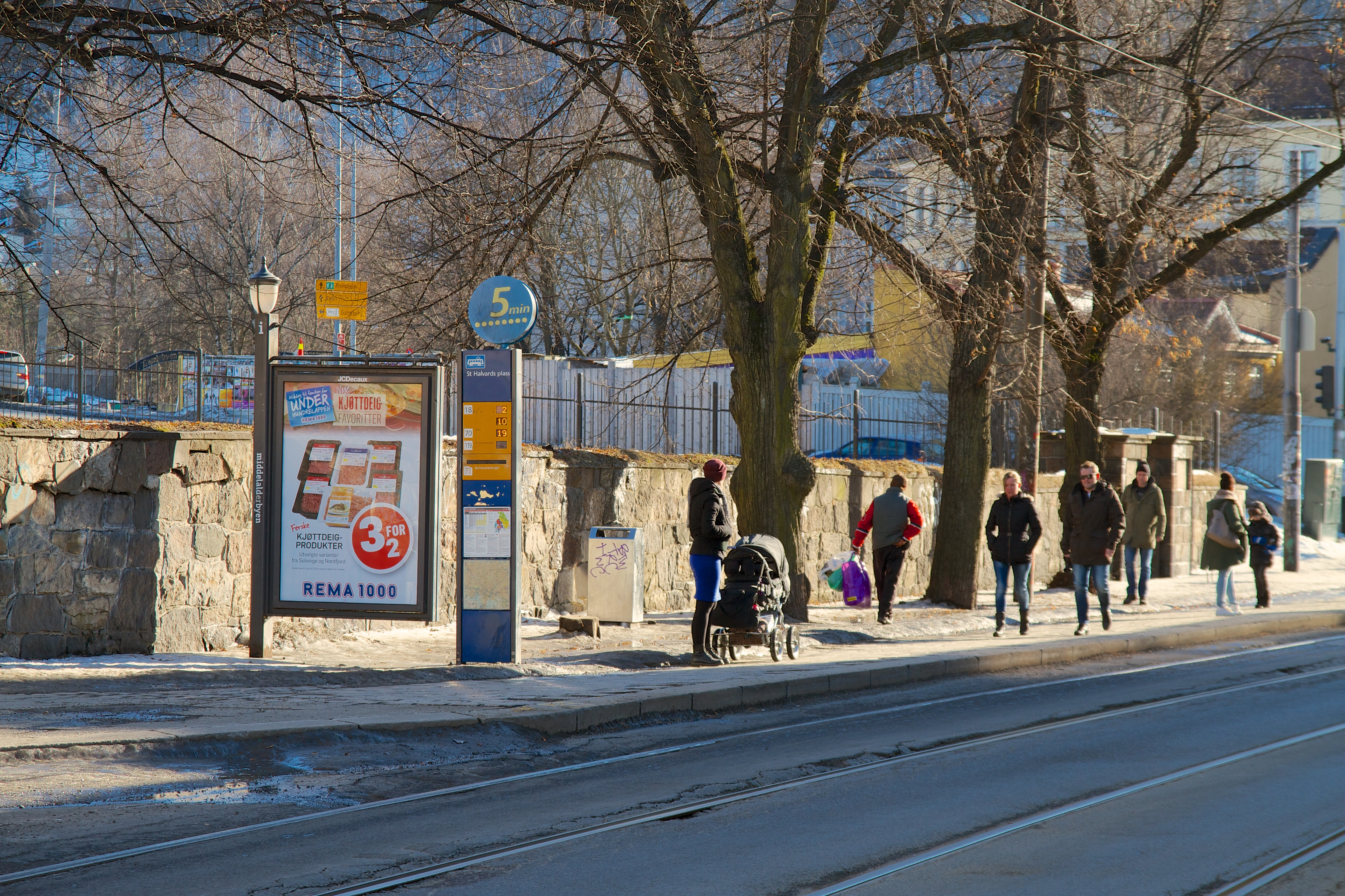 St. Halvards plass holdeplass